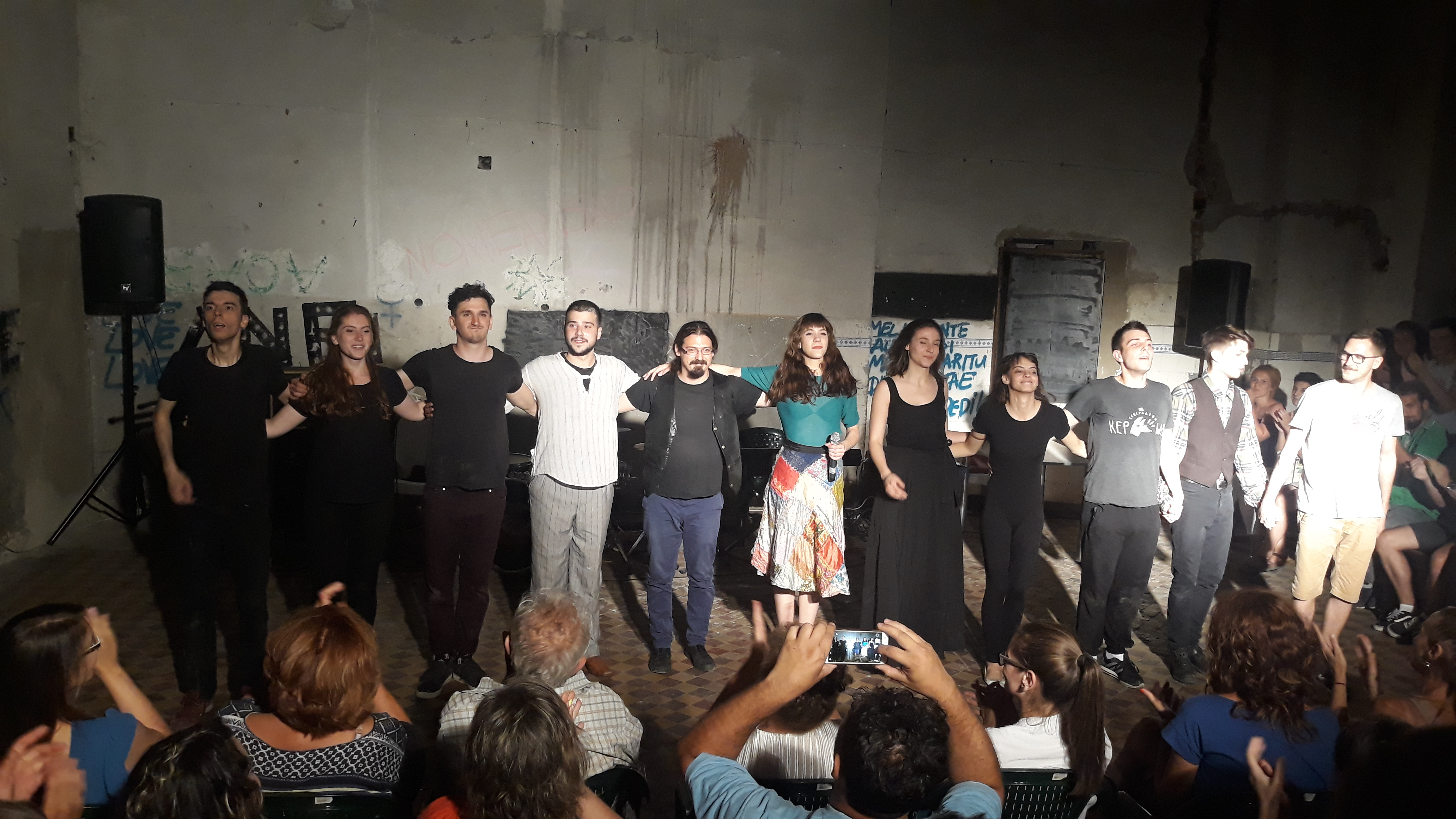 Представа Shakespeare tribute band / Shakespeare party, у извођењу студената глуме Академије уметности Универзитета у Новом Саду, класа професора Никите Миливојевића. Фотографије су начињене на претпоследњој вечери фестивала А. Н. Ф. И. театар у Краљеву. Играју: Дарко Радојевић, Ђорђе Митровић, Огњен Никола Радуловић, Ненад Поповић, Милош Мацура, Маја Чампар, Николина Вујевић, Аница Петровић, Марија Фелдеши, Невена Неранџић, Алекса Пантић, Ружица Ања Тадић, Владислав Велковски и Иван Вања Алач.